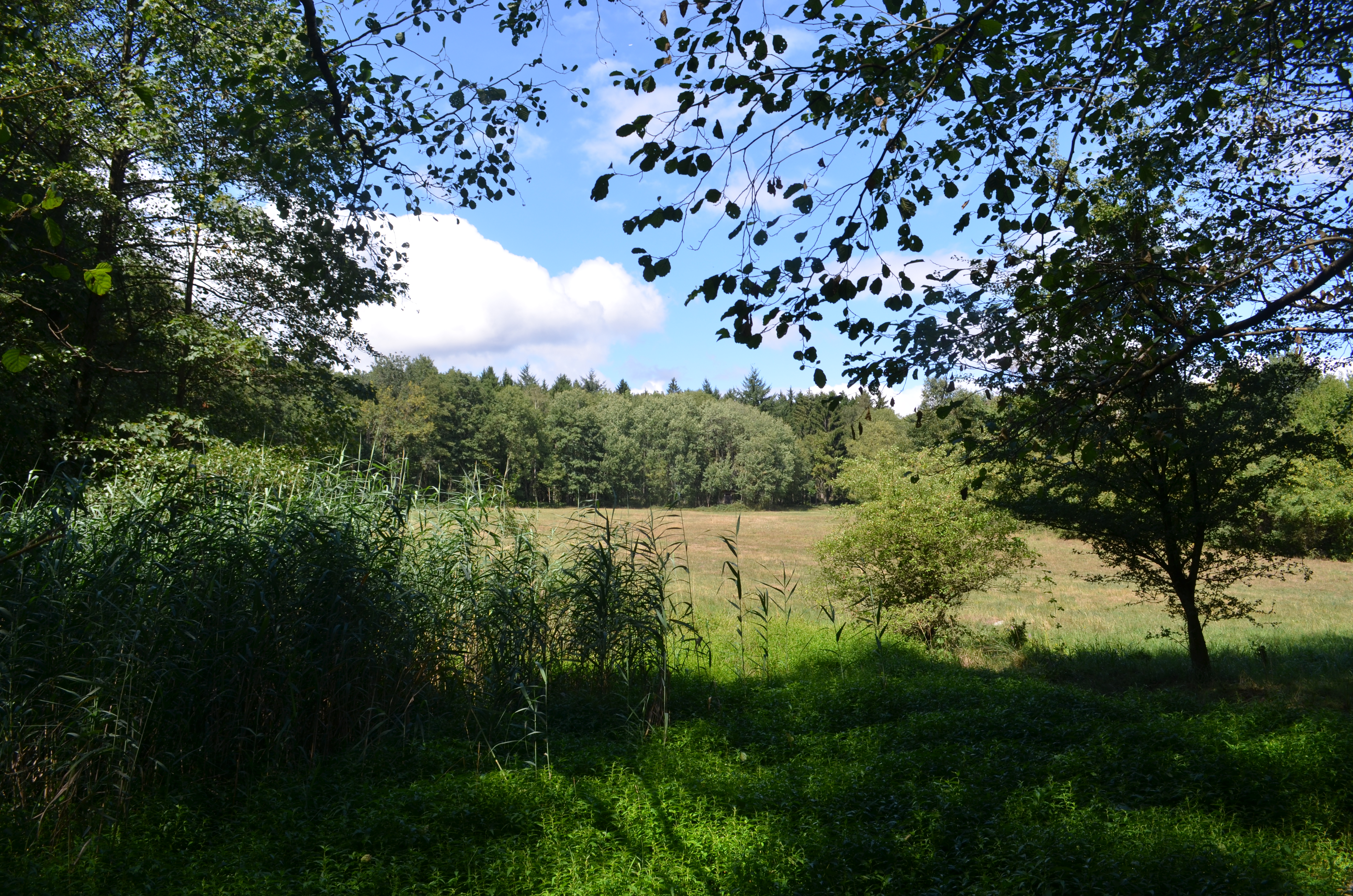 Kronberg, NSG Hinterste Neuwiese bei Kronberg